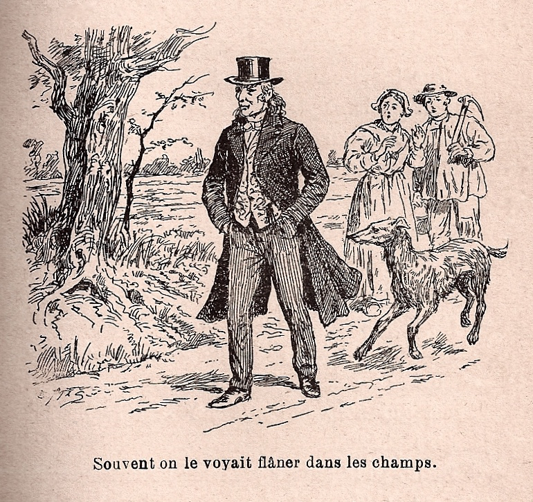 Le docteur Solidor, Contes du samedi, Mathieu Fournier, page 57. Dessin d'Émile Mas.